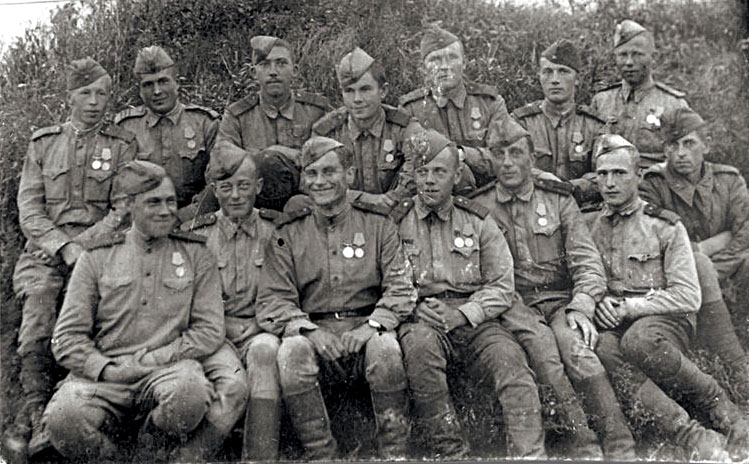 Юрий Владимирович Никулин (2-й ряд, 3-й слева) с однополчанами